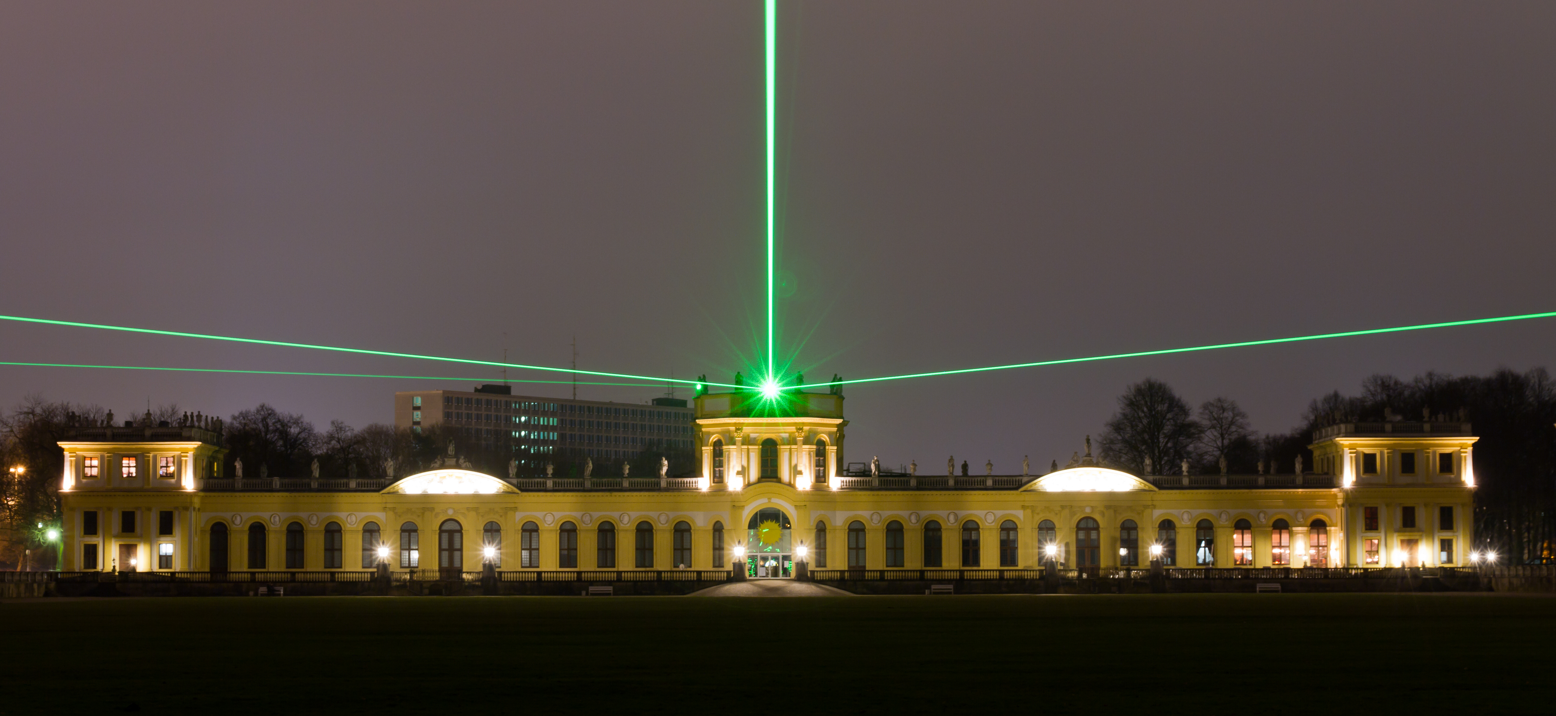 Orangerie in der Karlsaue in Kassel bei Nacht. Im Bild zu sehen ist die Laserinstallation "Laserscape Kassel".